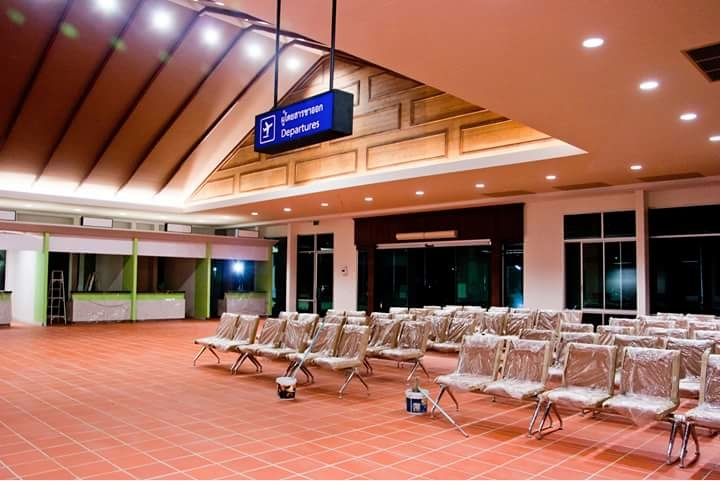 Lampang Airport